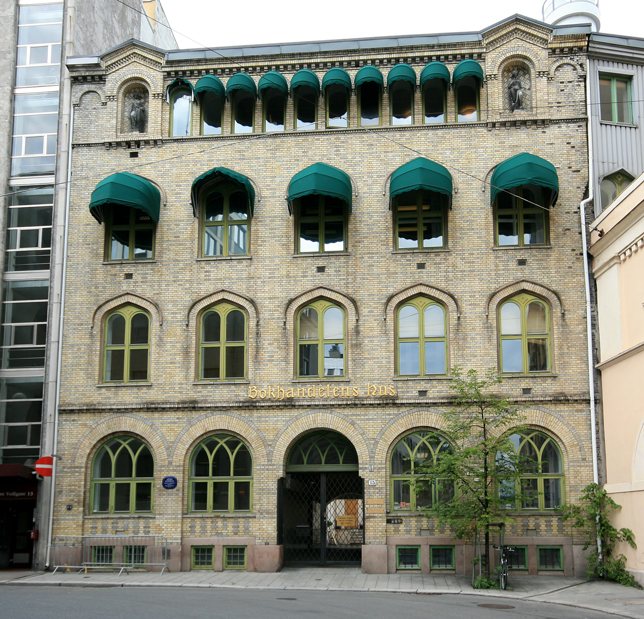 Bokhandelens hus, Øvre Vollgate 15, Oslo. Oppført 1860 for G.L. Olsen; arkitekt Emil Langlet. Lokaler for Nissens Pigeskole 1860-1899.